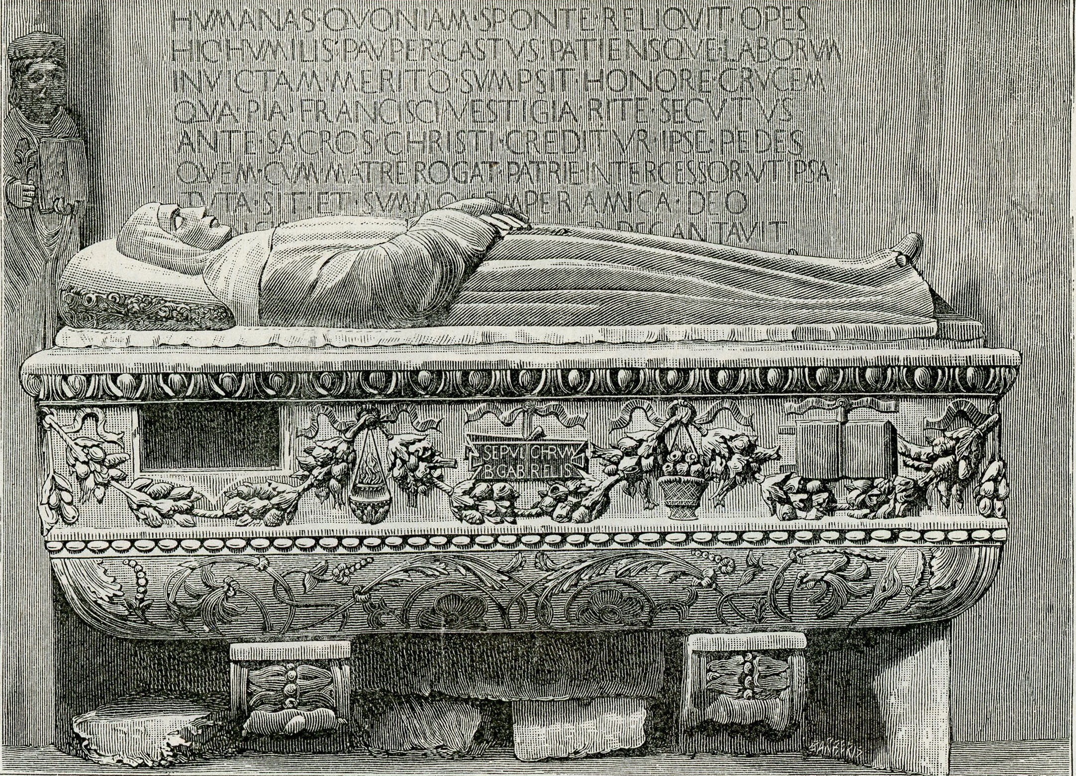 Ancona (Cattedrale): Tomba del Beato Gabriele Ferretti (xilografia).